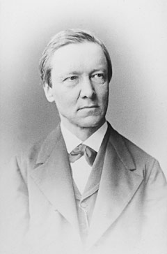 Portrait